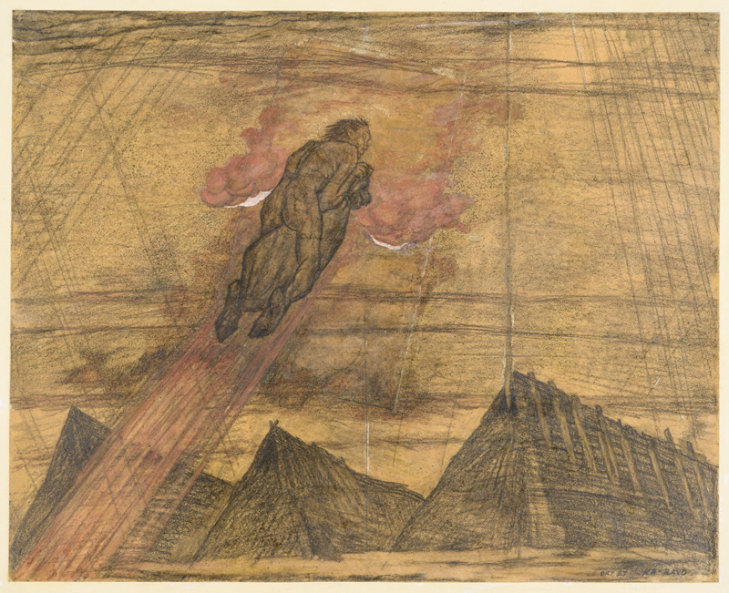 Autor Raud, Kristjan Nimetus Kratt-Viija Olemus joonistus Dateering 1927 Originaal originaal Lisanimed endine nimetus: Eesti rahva muistendi ainetel Seisund hea Eraldatavad osad Tehnika pliiats; guašš Materjal paber Mõõdud kujutise kõrgus: 36.8 cm; kujutise laius: 45.8 cm